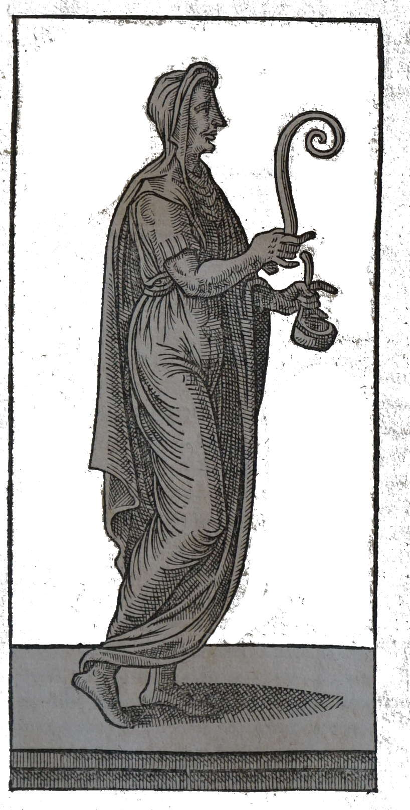 extrait du livre "Les décades ...de Tite Live...".